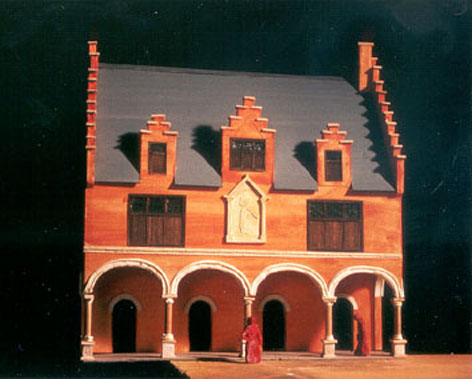 Halle échevinale de Tourcoing (XVIIe siècle) (maquette).